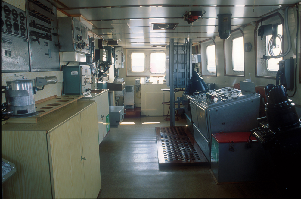 Die Brücke